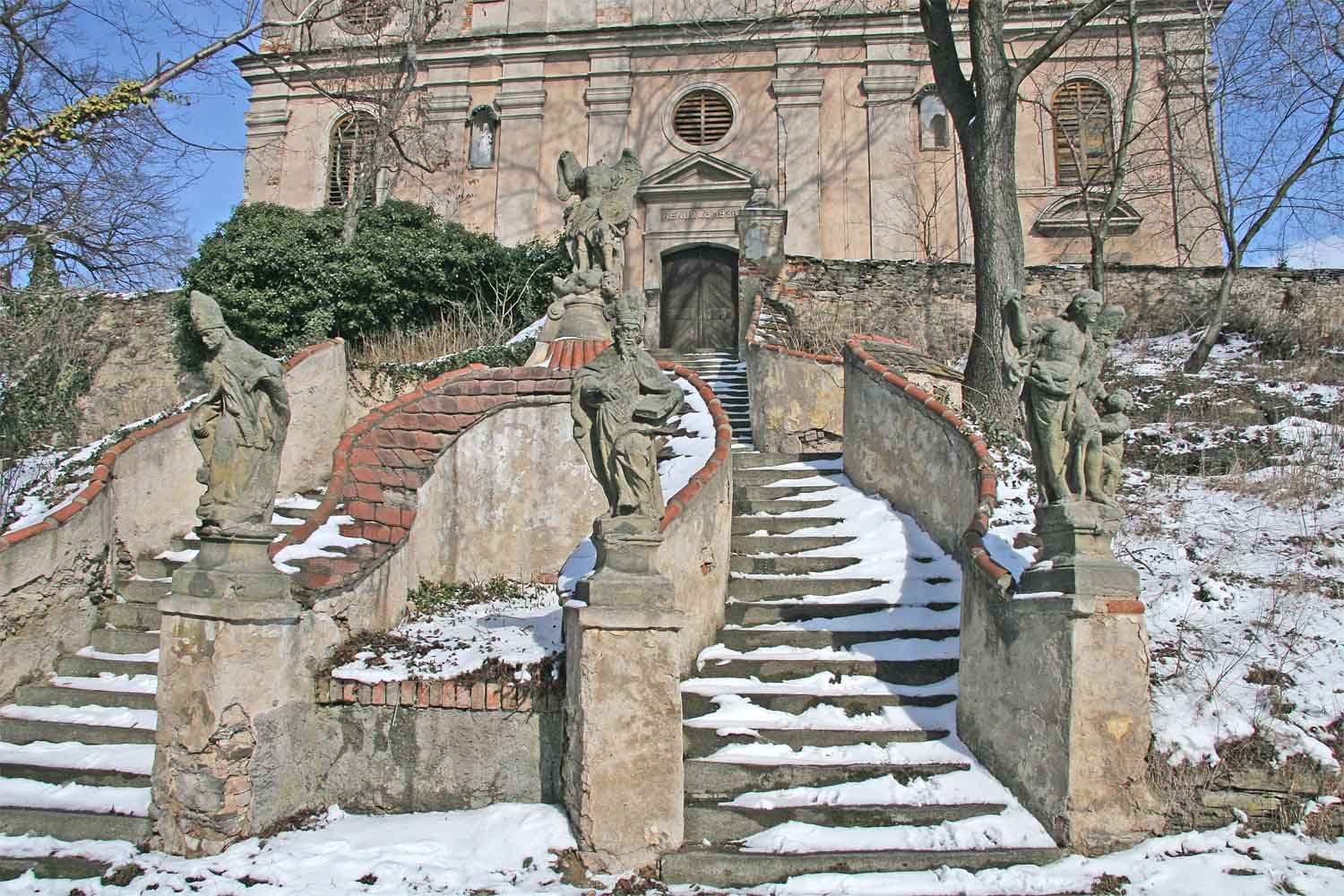 Sochy na schodišti u kostela Nejsvětější Trojice ve Zbyslavi